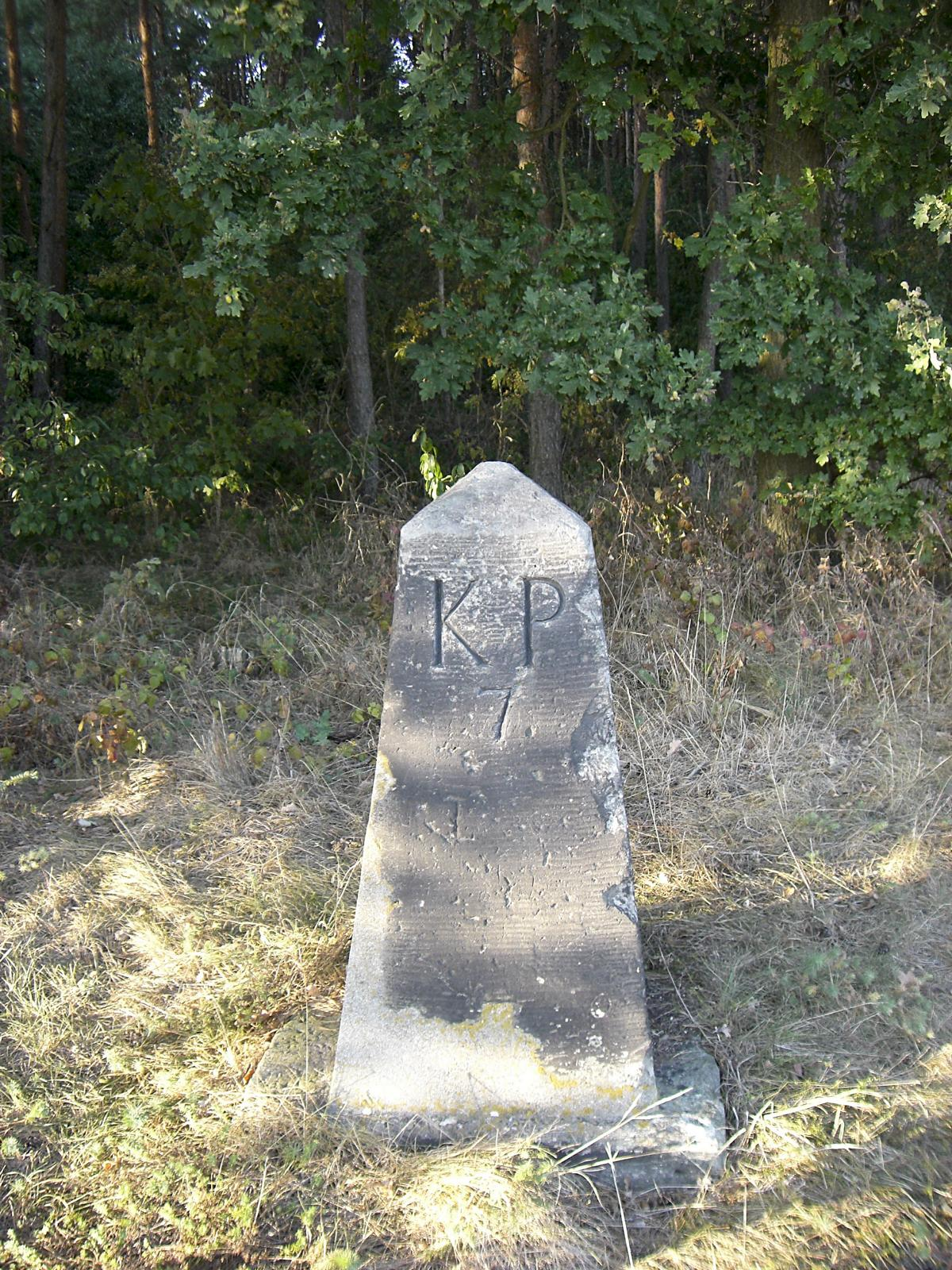 Grenzstein KP / KS Nr. 7 (Hauptstein) Historische Landesgrenze Königreich Sachsen Königreich Preußen 1815 (Wiener Kongress)